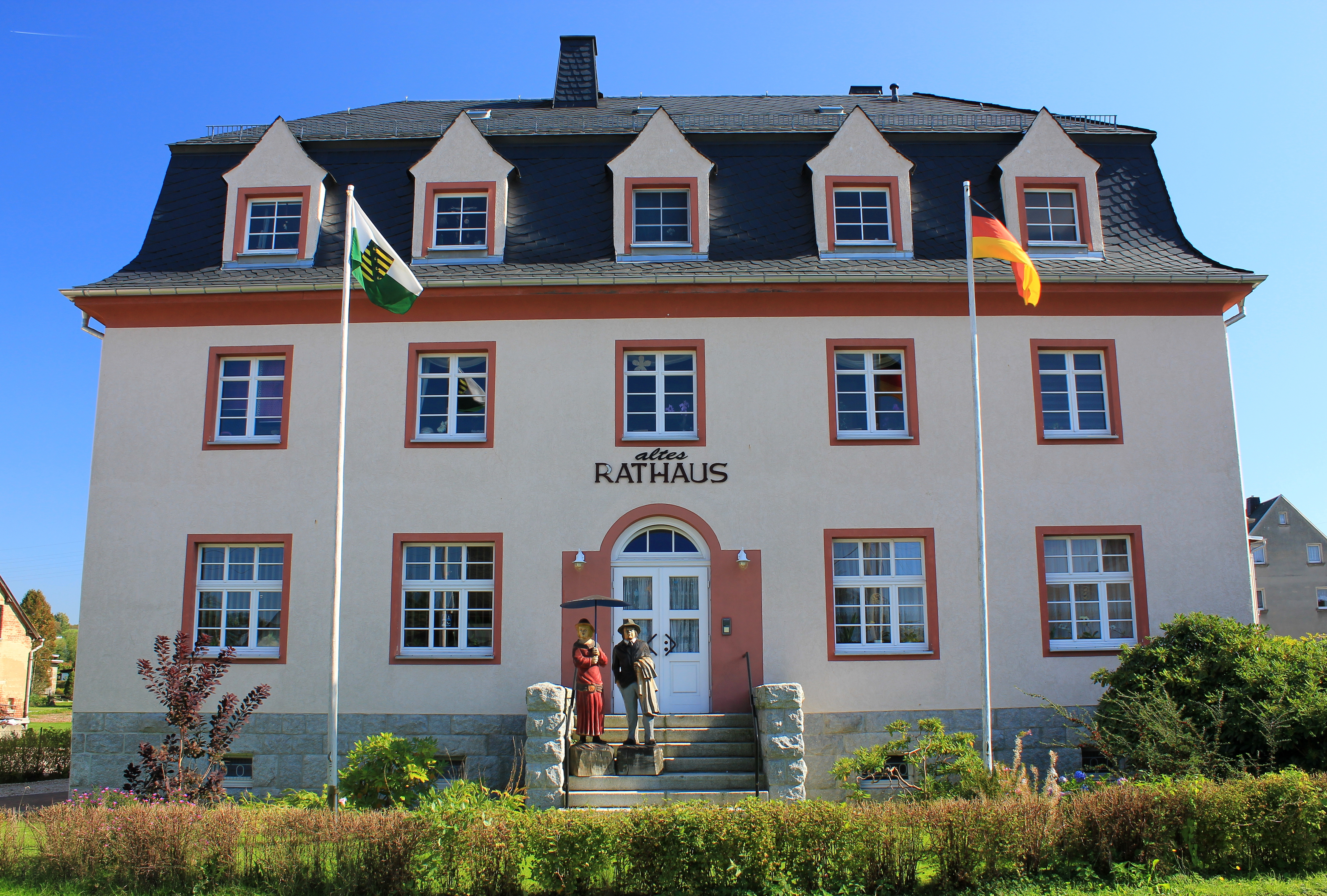 Altes Rathaus. Neuwürschnitz. Erzgebirgskreis. Sachsen.